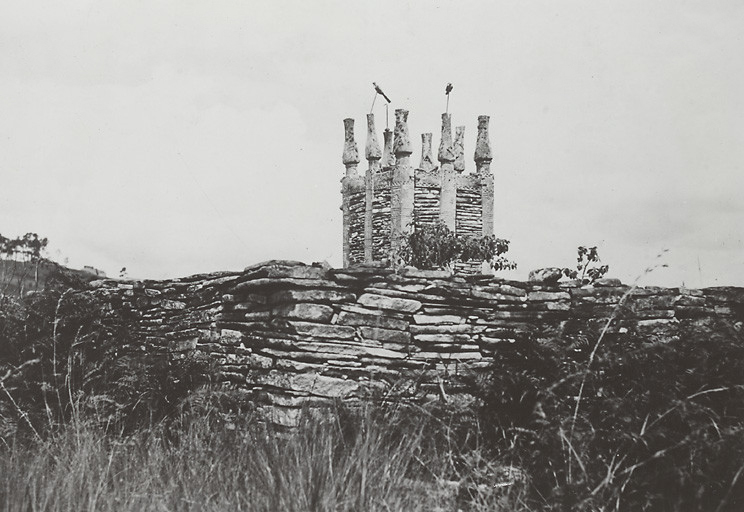 Tombeau Betsileo surmonté de Teza, dans la région Betsileo de Madagascar.